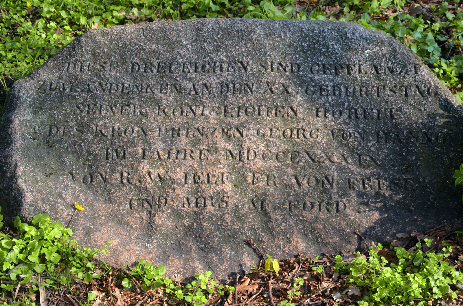 Der zur Zeit des Königreichs Hannover im Jahr 1839 zum 20. Geburtstag des Tronfolgers und zukünftigen Königs Georg von Hannover gesetzte Georgsstein am Fuß der als Naturdenkmäler ausgezeichneten Eichen im Georgengarten von Hannover, mit der Inschrift „DIESE DREI EICHEN SIND GEPFLANZT ZUM ANDENKEN AN DEN XX. GEBURTAG SEINER KÖNIGLICHEN HOHEIT DES KRONPRINZEN GEORG VON HANNOVER IM JAHRE MDCCCXXXIX VON R. [...]“ ...